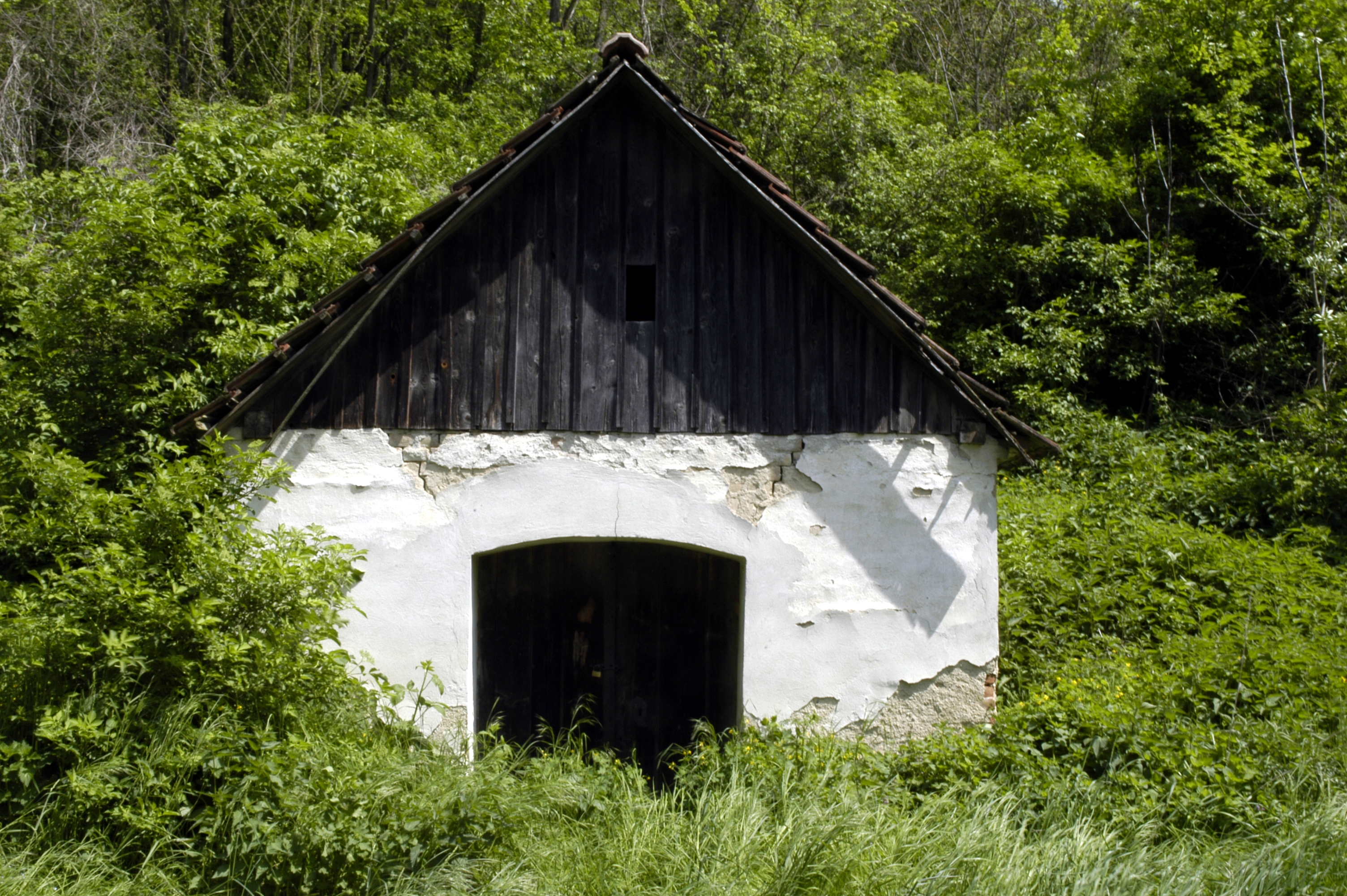 Objekt in der Mühlkellergasse in Frauendorf an der Schmida